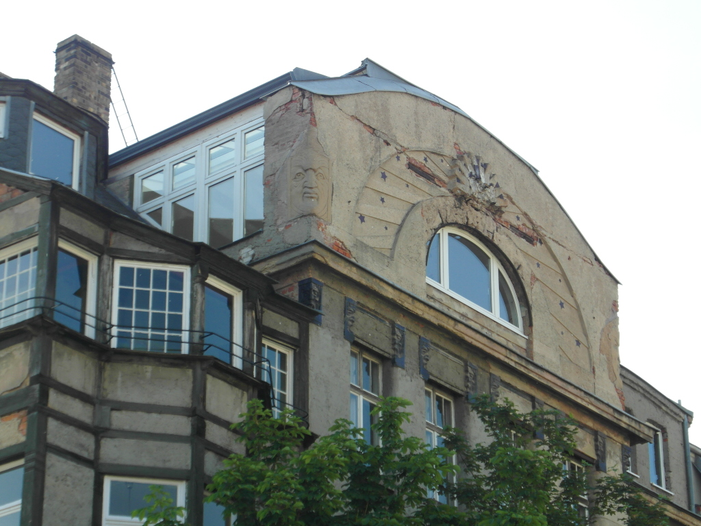 Ehemaliges Atelier des Grafikers Bruno Héroux. Architekt: Georg Wünschmann, Fassadenschmuck: Bruno Héroux